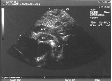 incidence supra-sternale : crosse aortique issue du ventricule antérieur (droit)